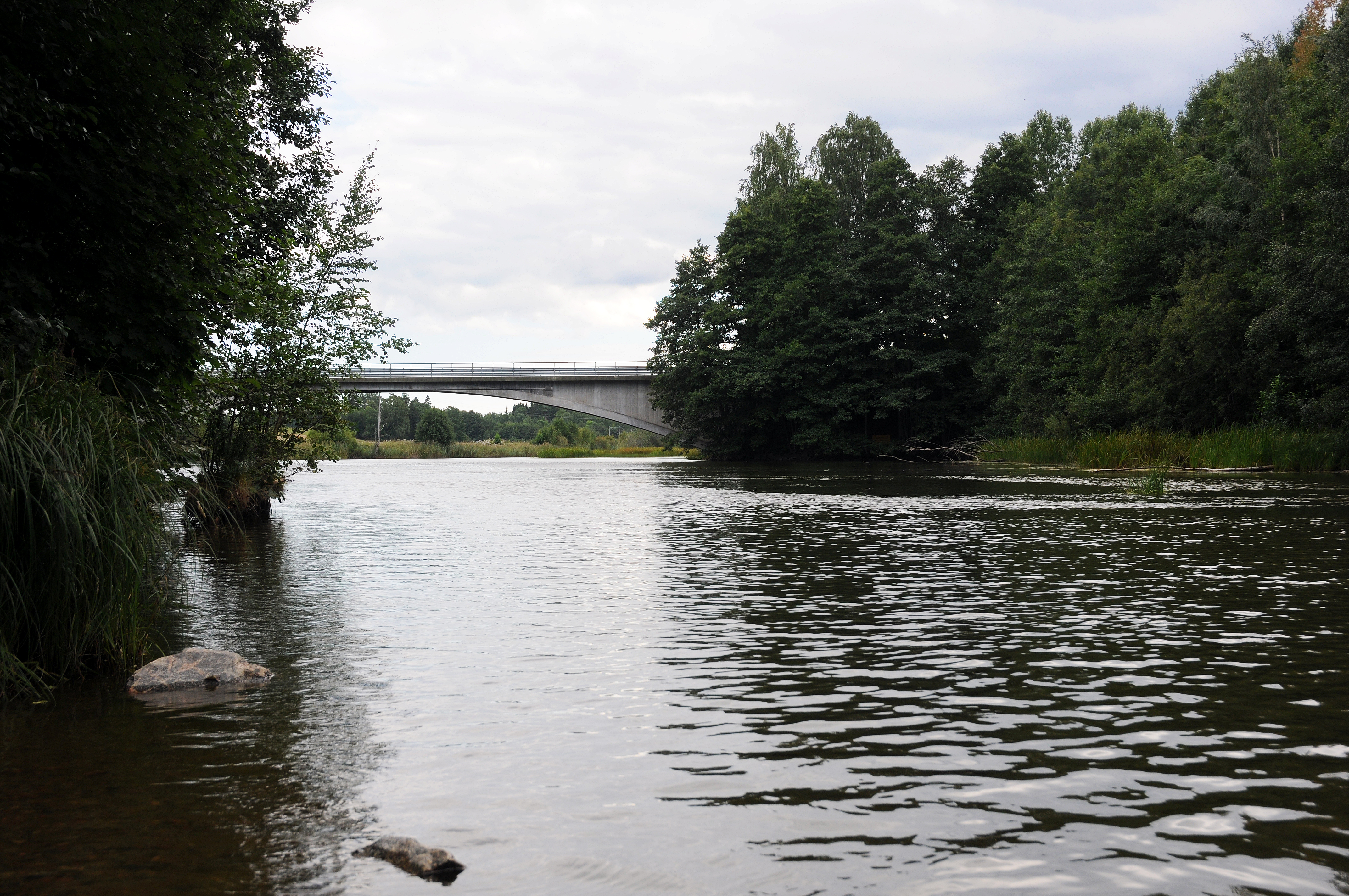 Nyköpingsån vid Täckhammarsbro, Nyköpings kommun